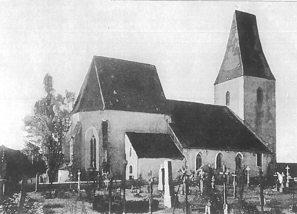 Pfarrkirche Döllersheim von Nordosten.